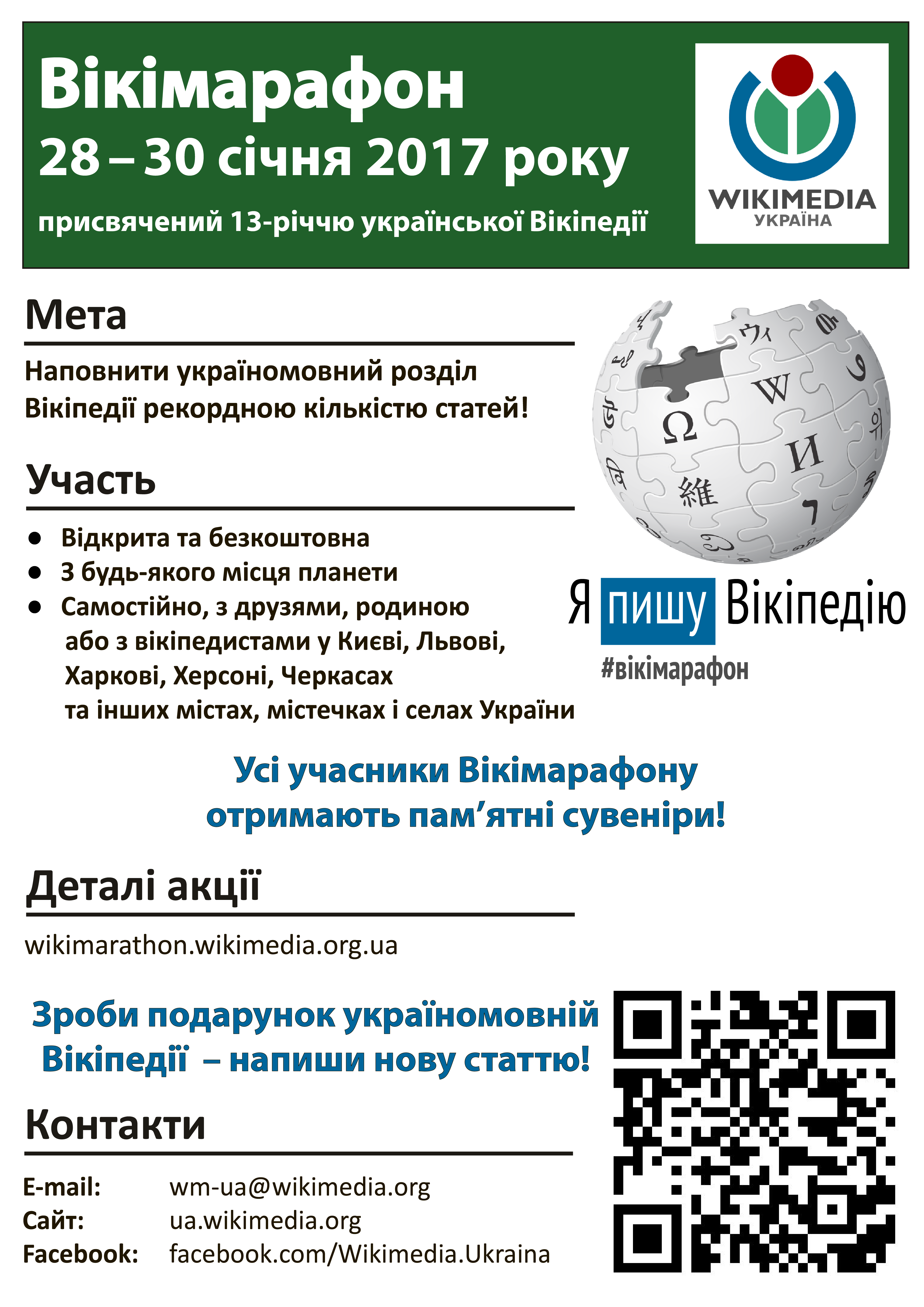 Загальноукраїнська афіша до Вікімарафону 2017 до дня народження української Вікіпедії. Варіант 19 січня